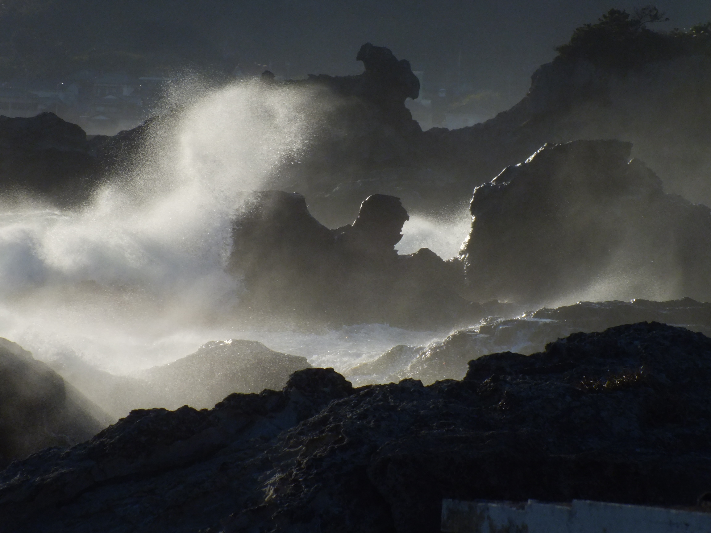 Futomihama,Kamogawa,Chiba 仁右衛門島から見る千葉県鴨川市太海浜